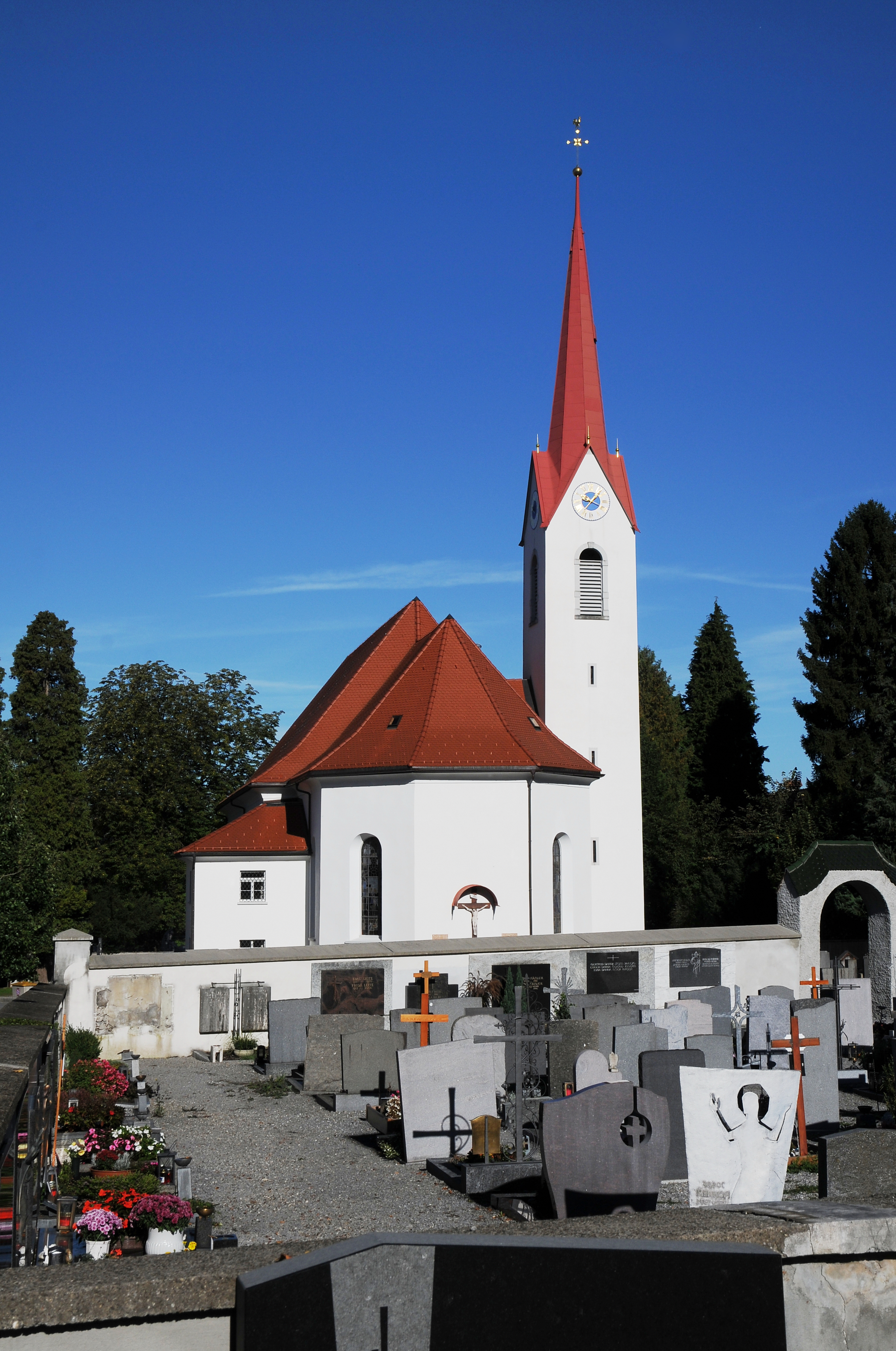 Kath. Pfarrkirche Zu Unserer Lieben Frau Mariä Heimsuchung im Stadtbezirk Haselstauden von Dornbirn.